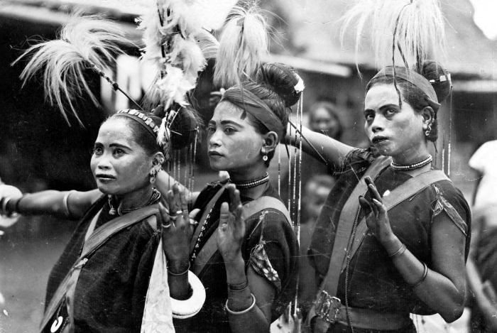 Repronegatief. Danseressen uit Flores